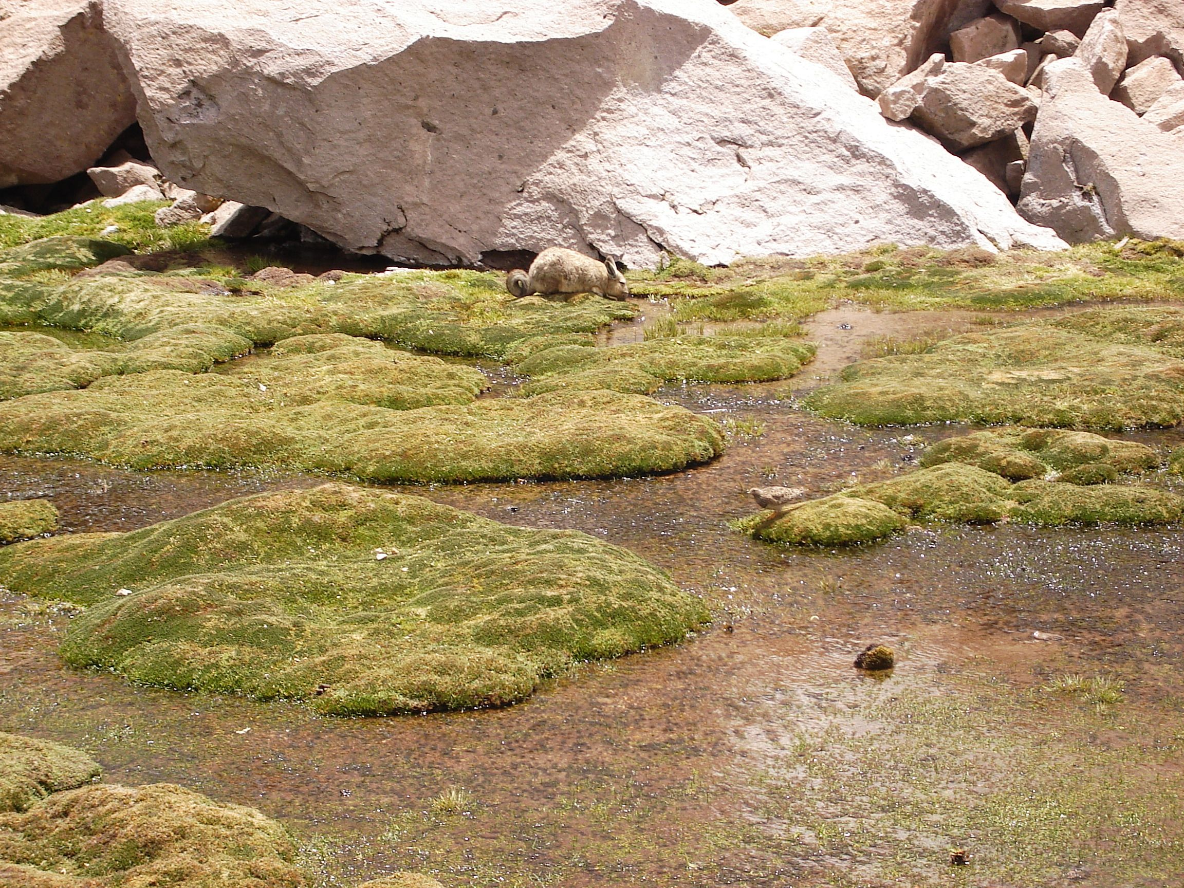 Foto tirada por mim, em Arica.